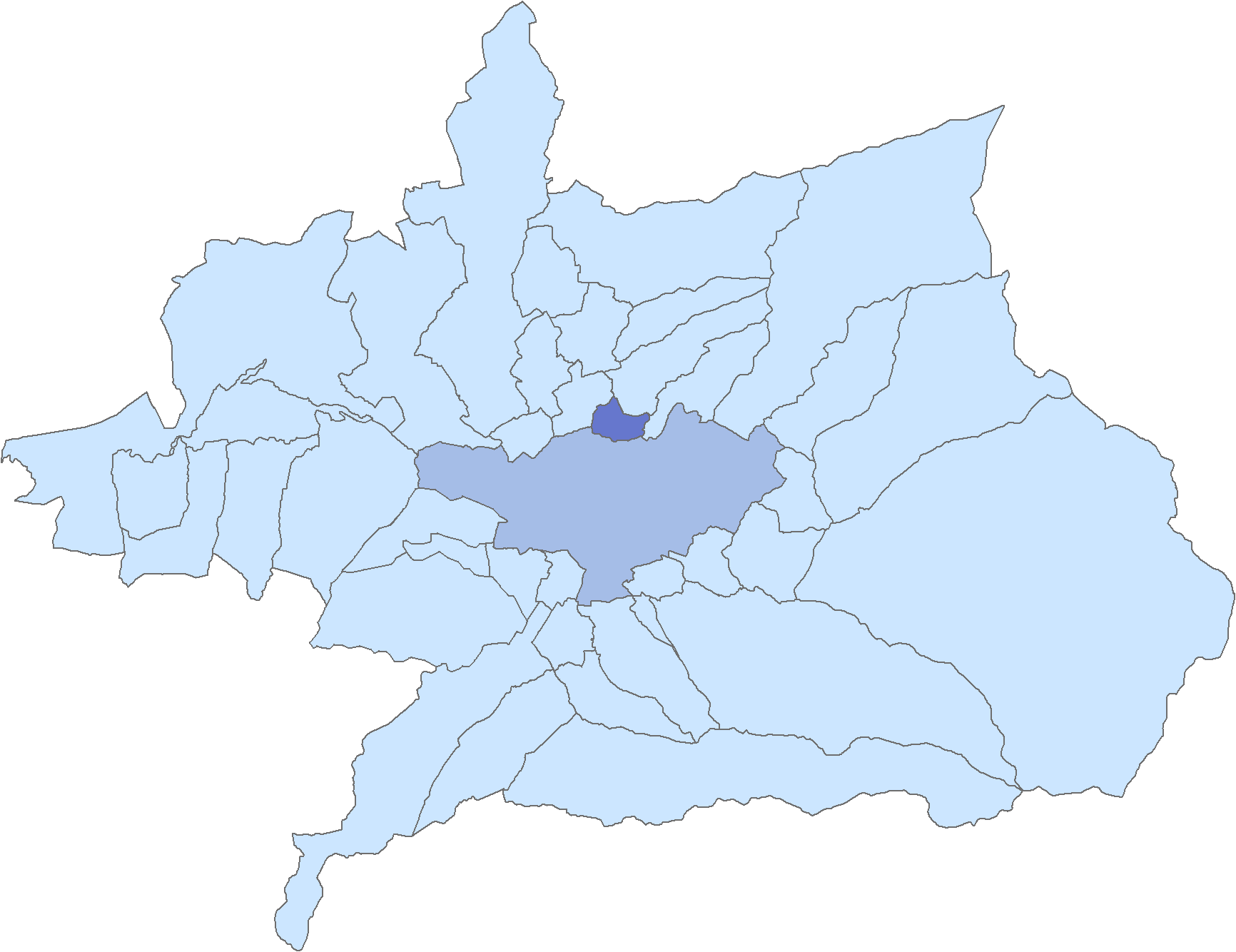 Situación del municipio de Jun respecto a la comarca de la Vega de Granada, en España.